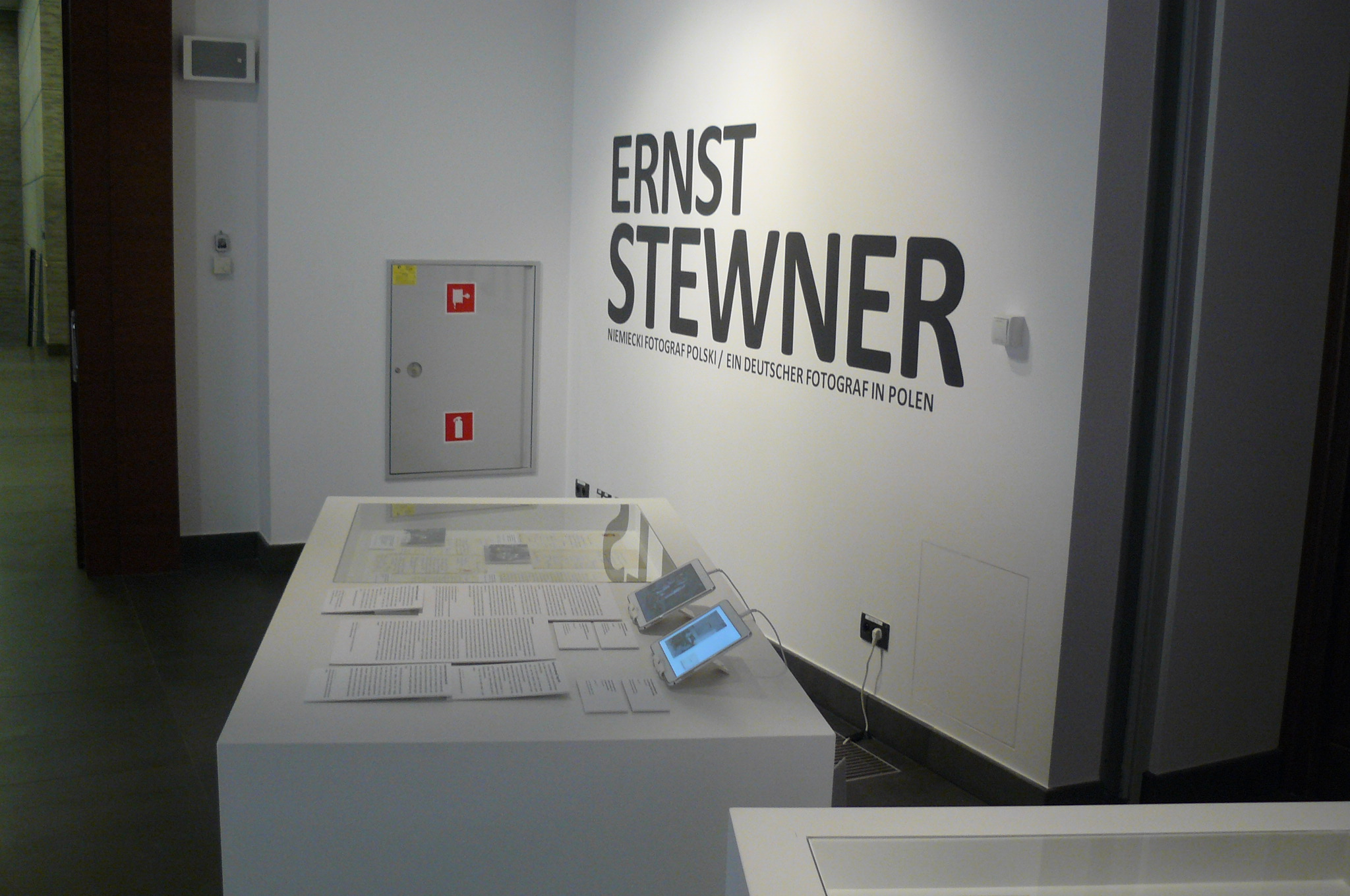 Wystawa Ernsta Stewnera w Poznaniu - Zamek Cesarski, grudzień 2014r.